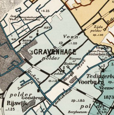 Veenpolder